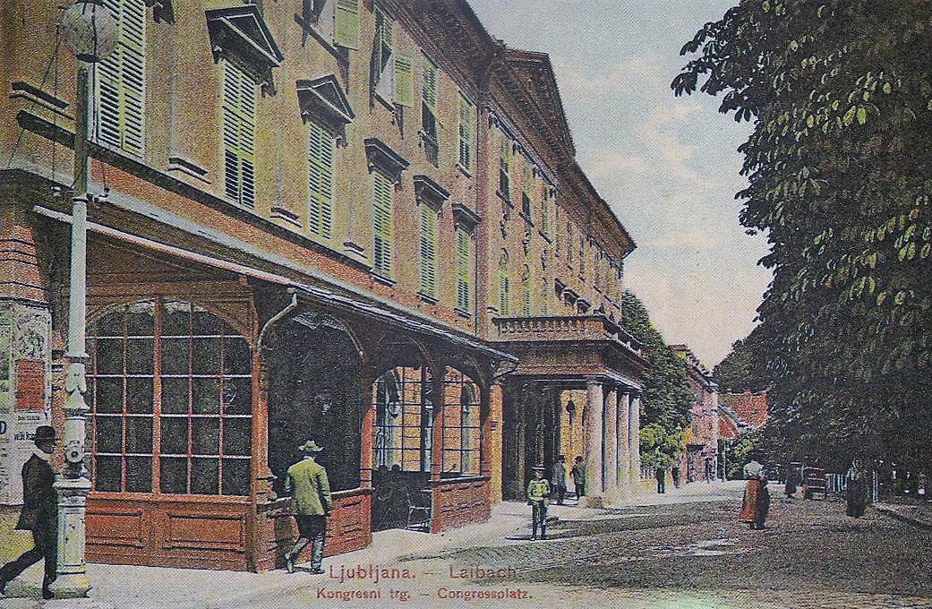 Razglednica kongresnega trga s Kazino.